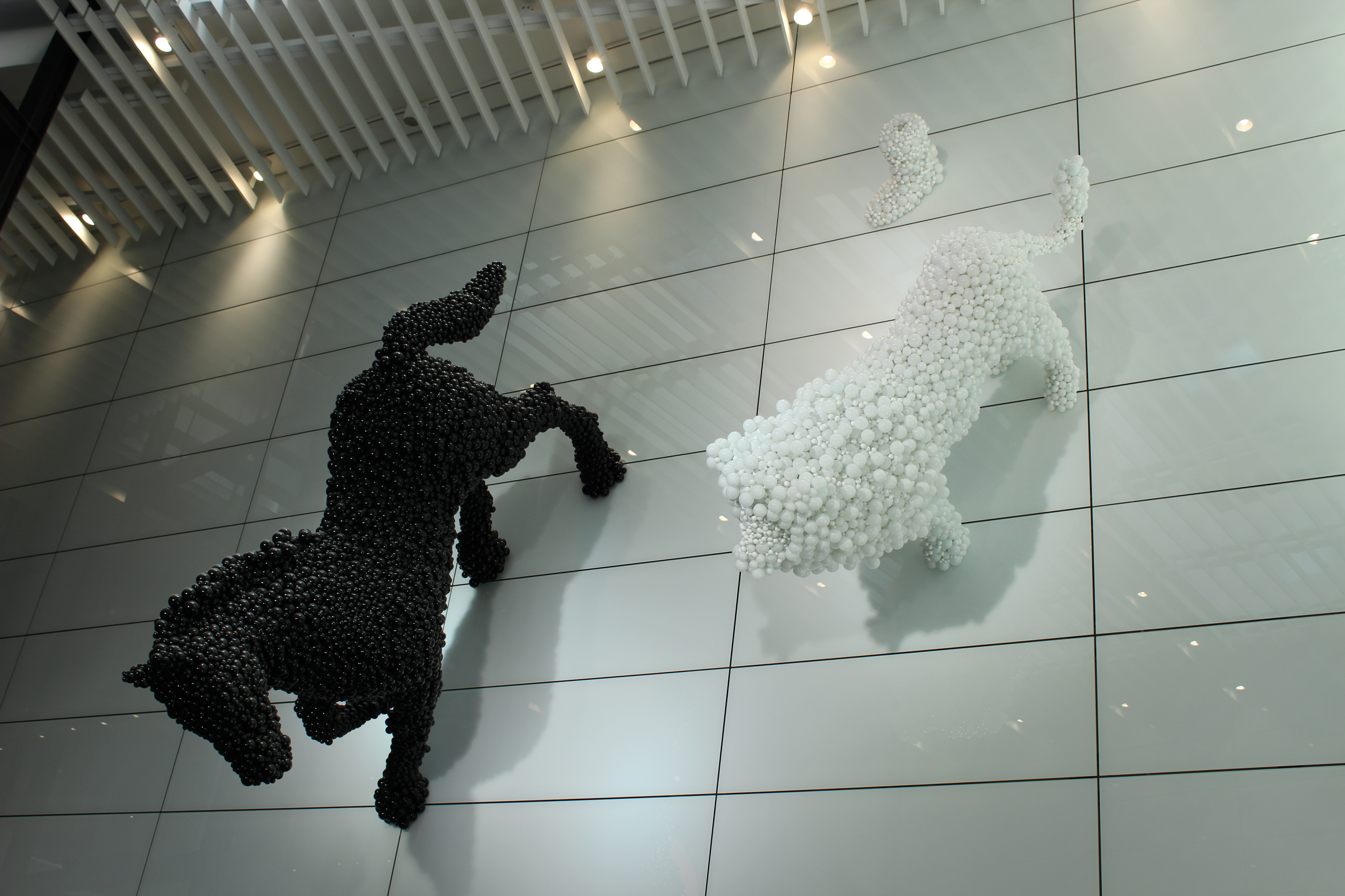 Plastiky Maxima Velčovského v pražském obchodním domě Quadrio během festivalu Open House Praha 2016. Skulptury připomínají budovy, jež původně stály v místech, kde vyrostlo obchodní centrum. Byly to Dům u černého koně, Dům u bílého lva a Dům u bílé botičky.